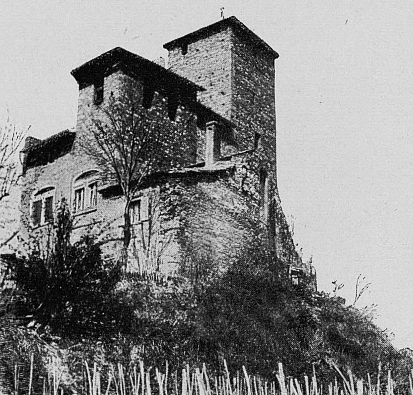 Dictionnaire illustré des communes du département du Rhône. Tome 1 / par MM. E. de Rolland et D. Clouzet.